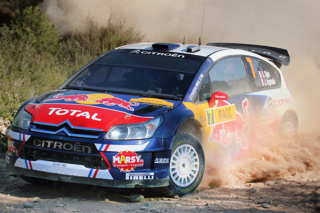 Ogier-Ingrassia Rally Catalunya 2010